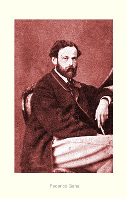 Fotofgrafía Proyecto Patrimonio